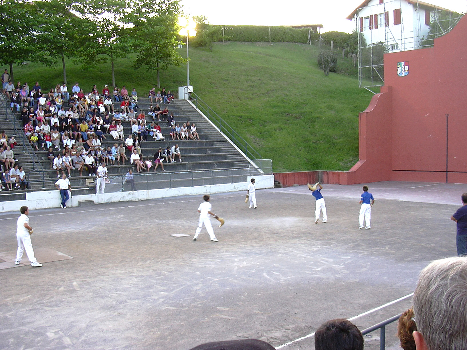 Bidart, partie de Chistéra. Photo prise le 28/07/04 par Harrieta171